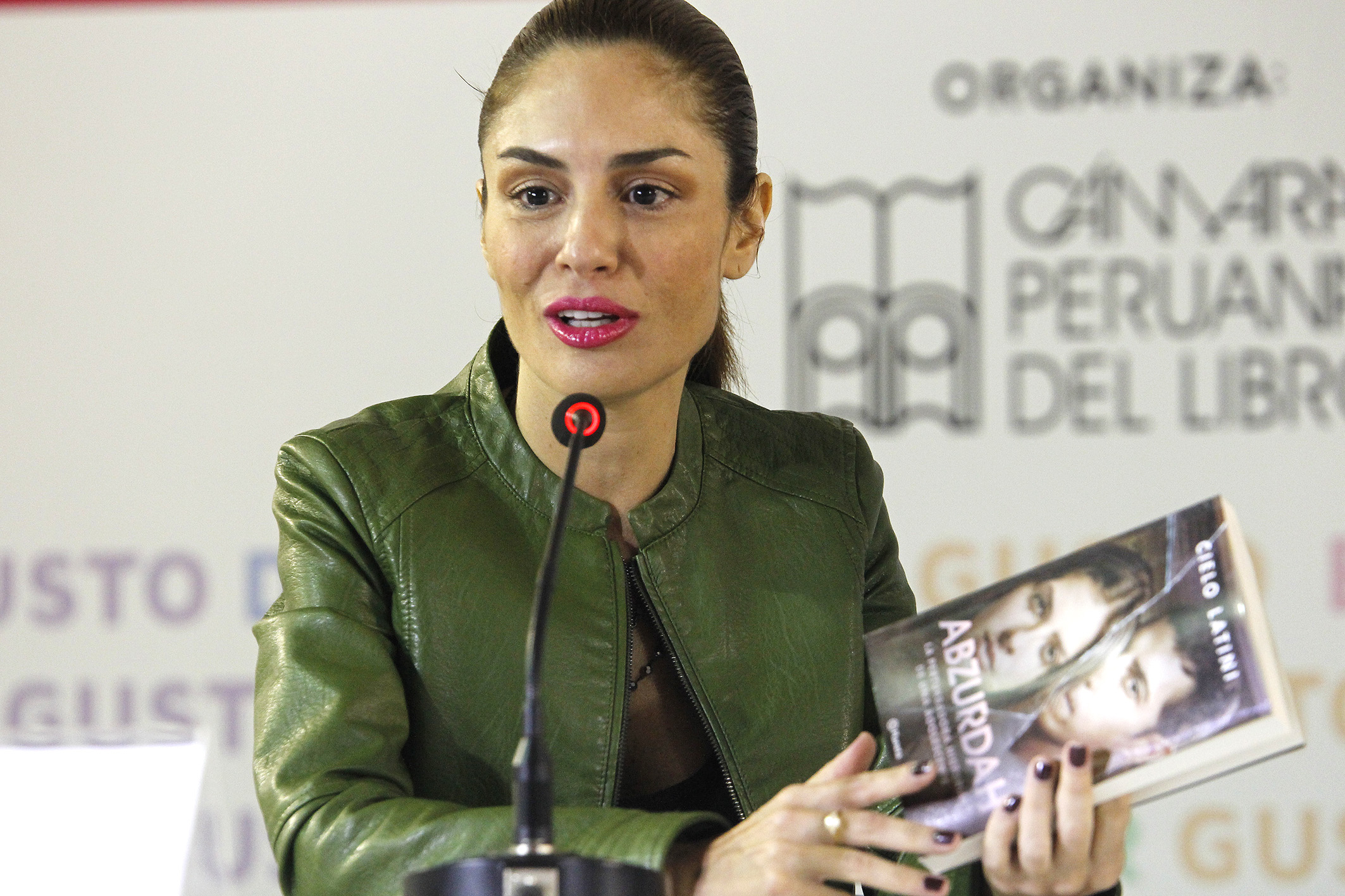 Mávila Huertas Centurión en 2015